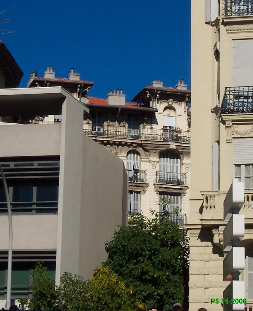 Palais des Arènes. 1908. Vue partielle à travers les immeubles de la Place Jean Moulin.